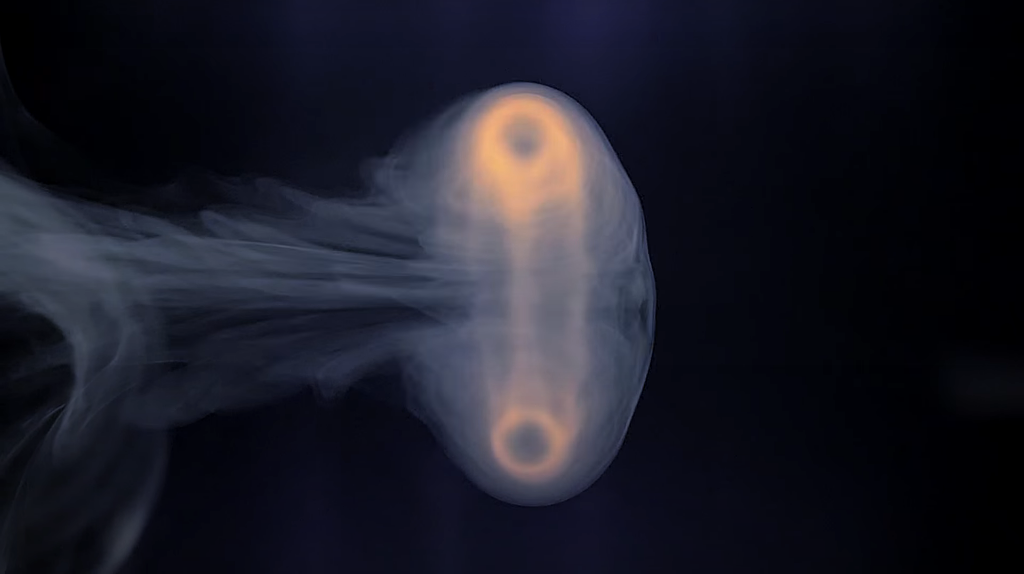 На фото хорошо видны части тороидального вихря и как он образуется в среде